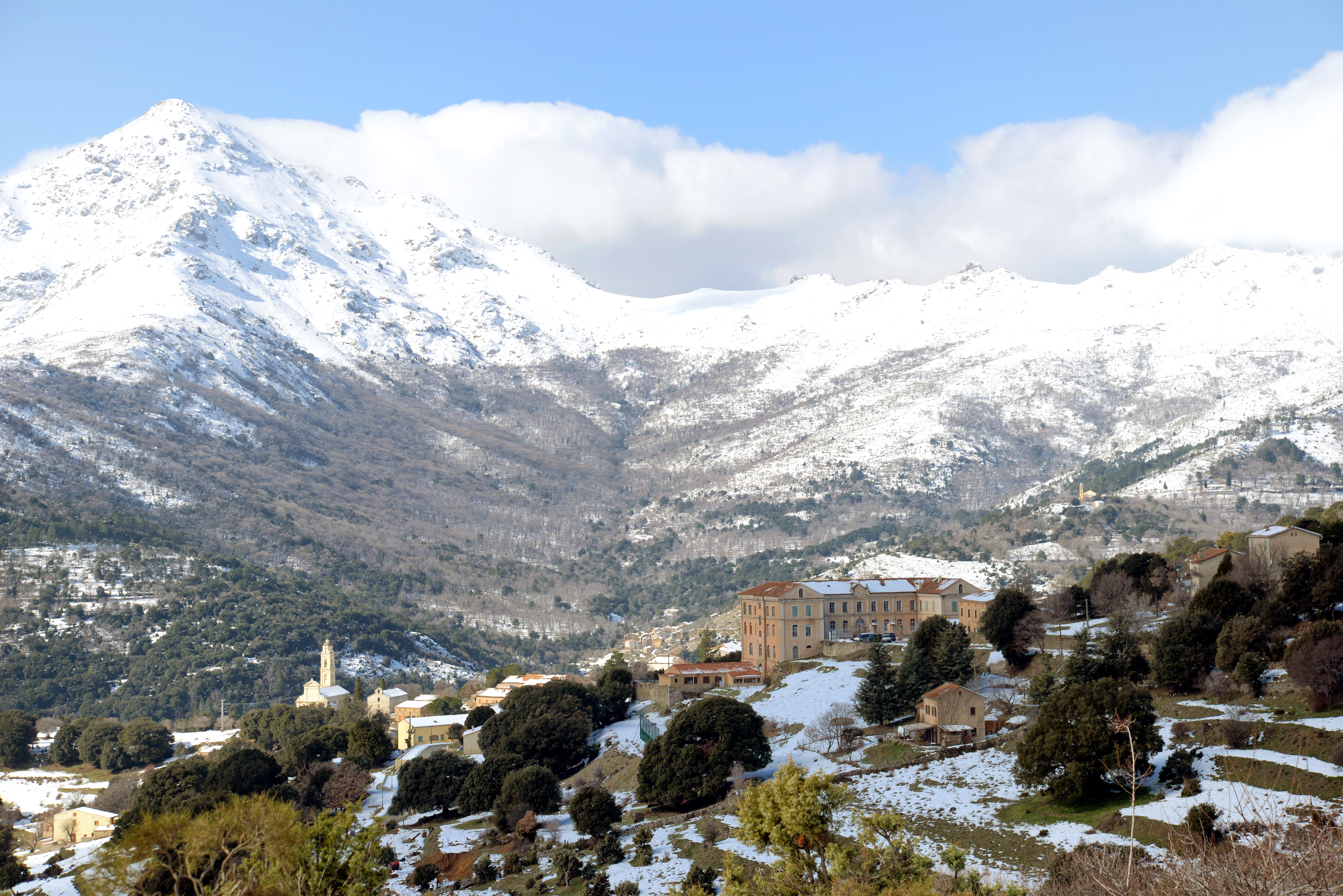 Olmi-Cappella, Giussani (Haute-Corse) - Vue du village en hiver. À l'arrière-plan, le San Parteo (1680m).